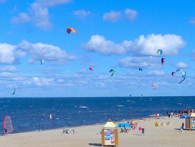 Plaża w Pucku - kitesurferzy, powiat pucki, województwo pomorskie, lato 2006. Beach in Puck - kitesurfers, Bay of Puck, Puck district, Pomorskie voivodeship, Poland, Baltic Sea, summer of 2006. Autor: Krzysztof